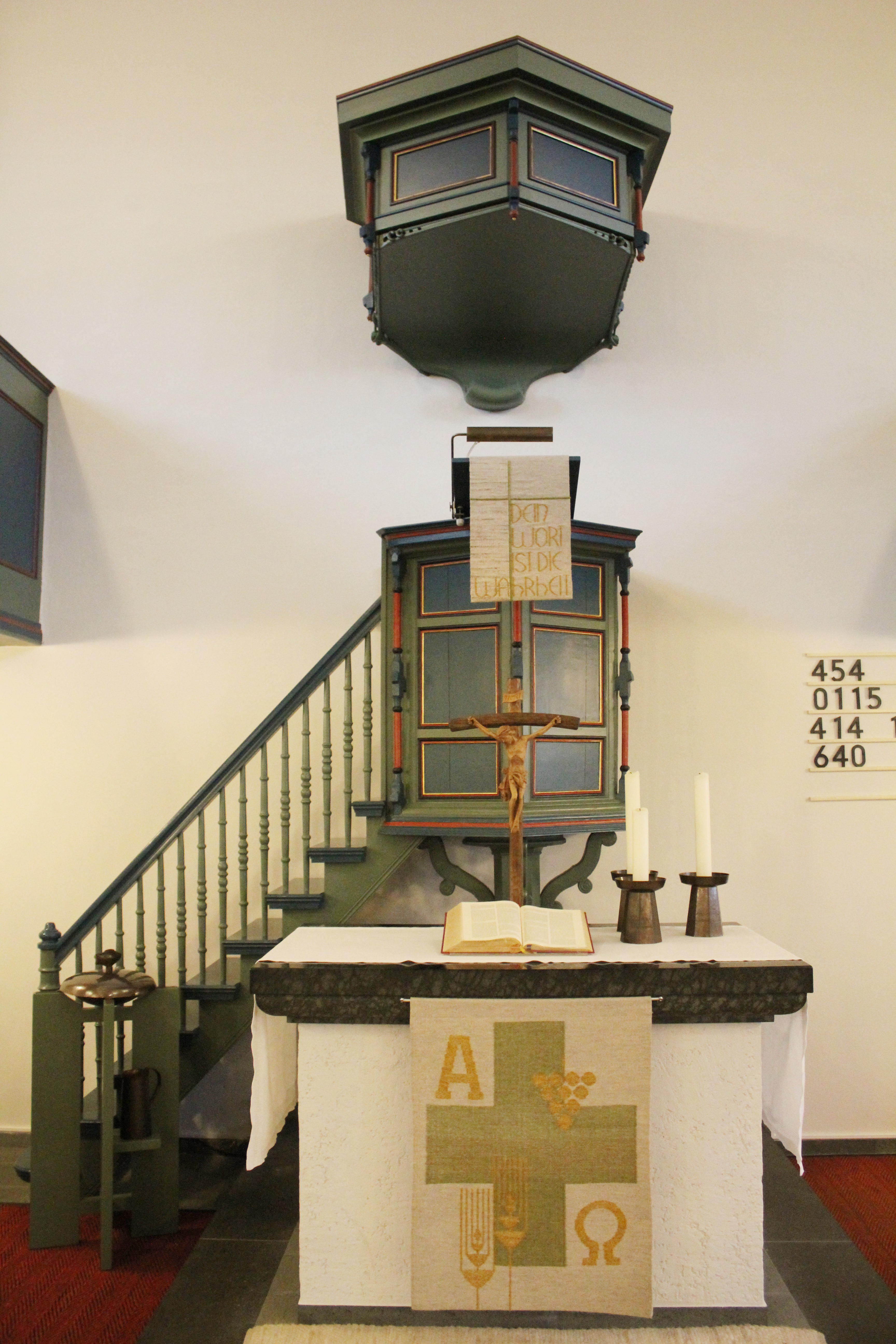 Evangelische Kirche Oberdieten, Breidenbach, Landkreis Marburg-Biedenkopf, Hessen, Deutschland